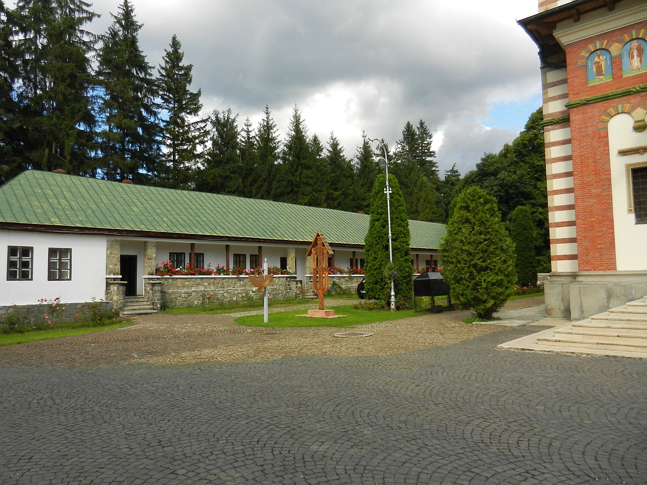 Chilii 04